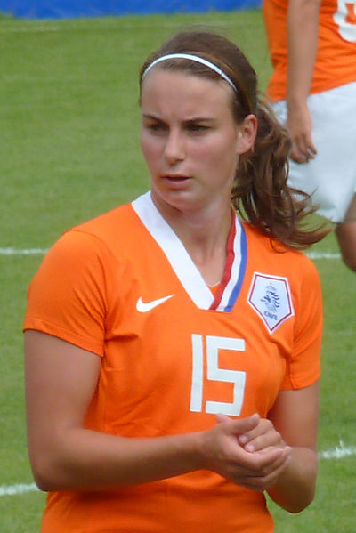 Renate Jansen en 2010